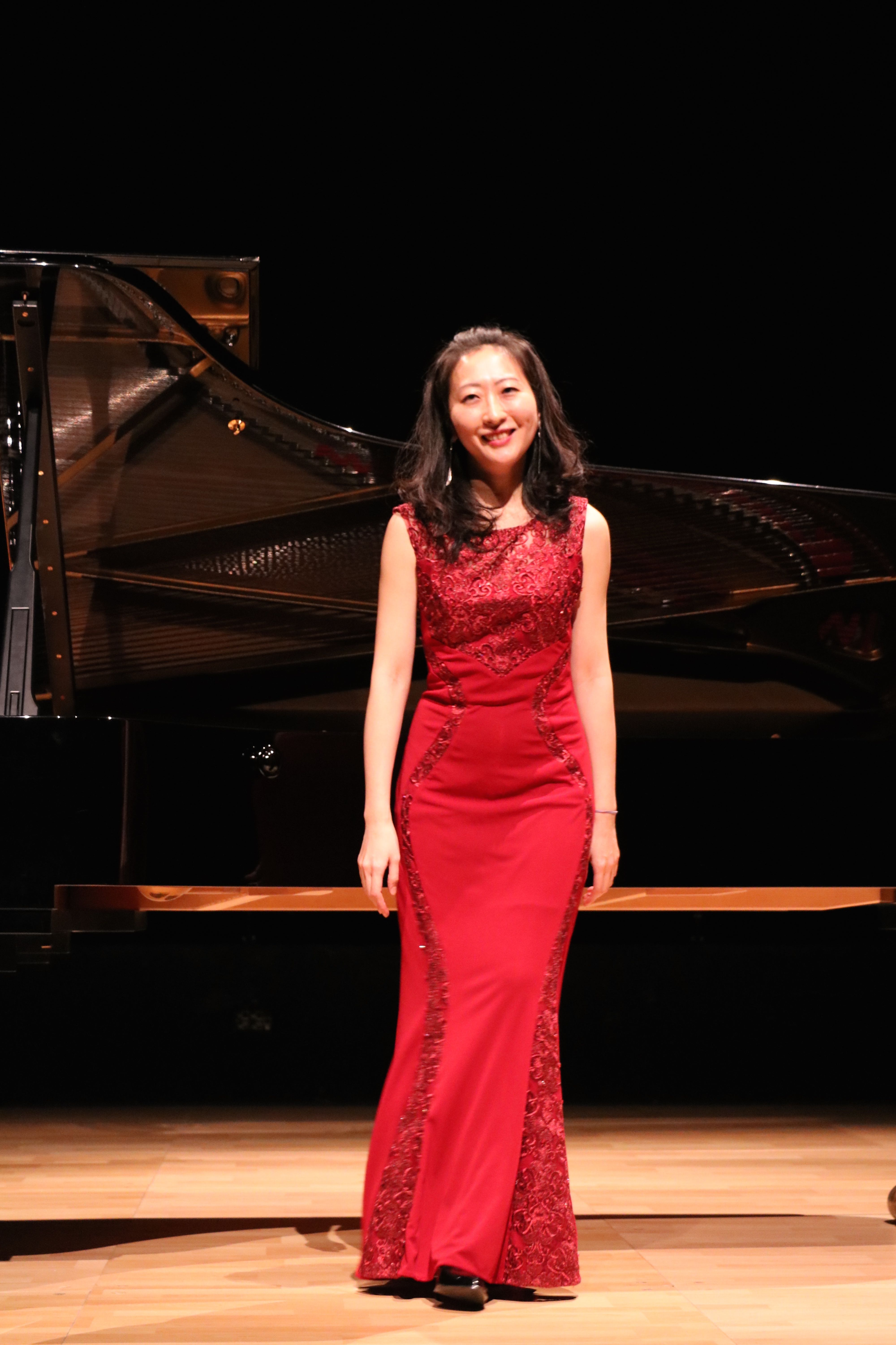 Etsuko Hirose à La Folle Journée 2018 (Nantes)